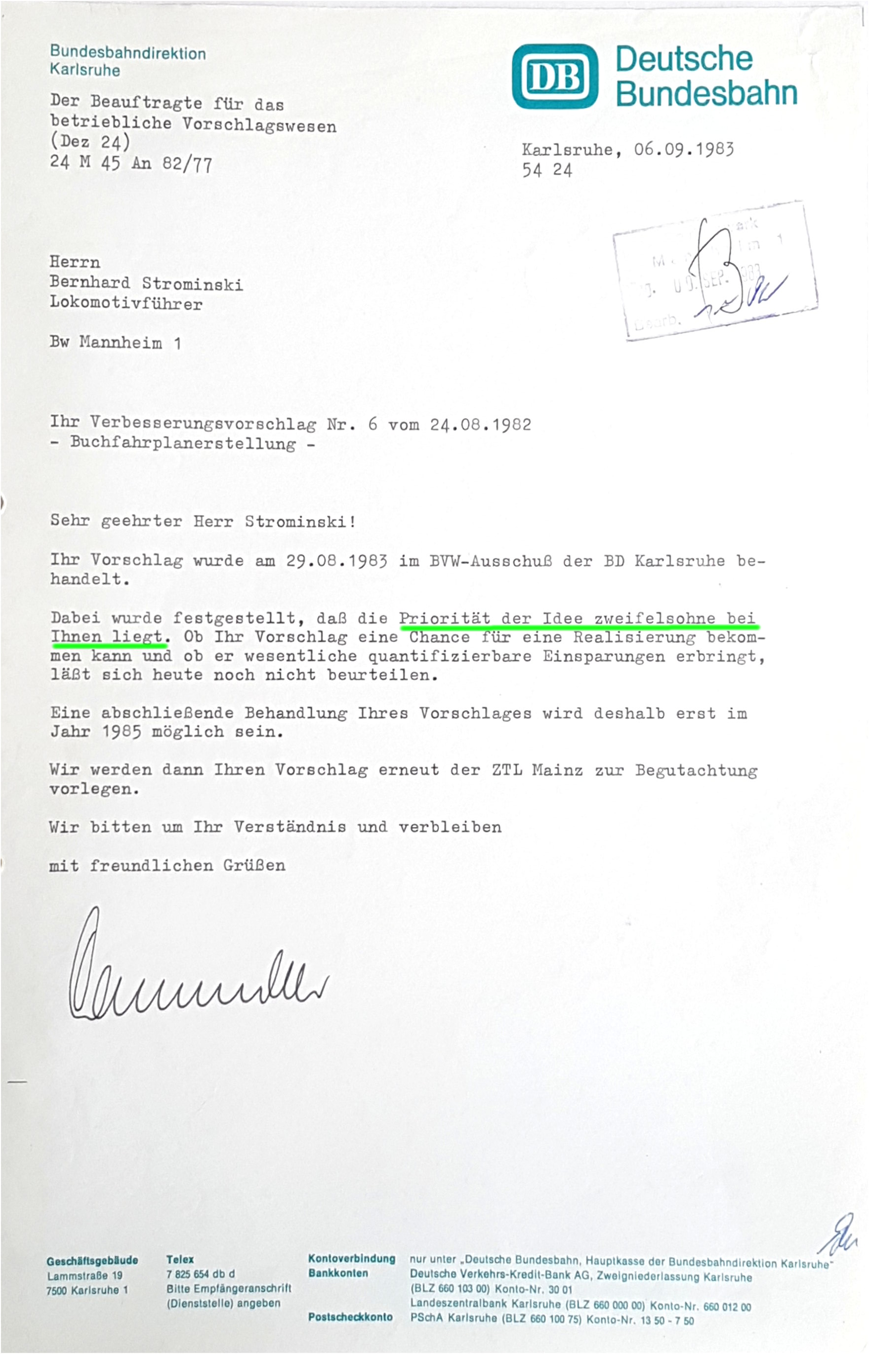 Priorität auf den EBula im Jahr 1983